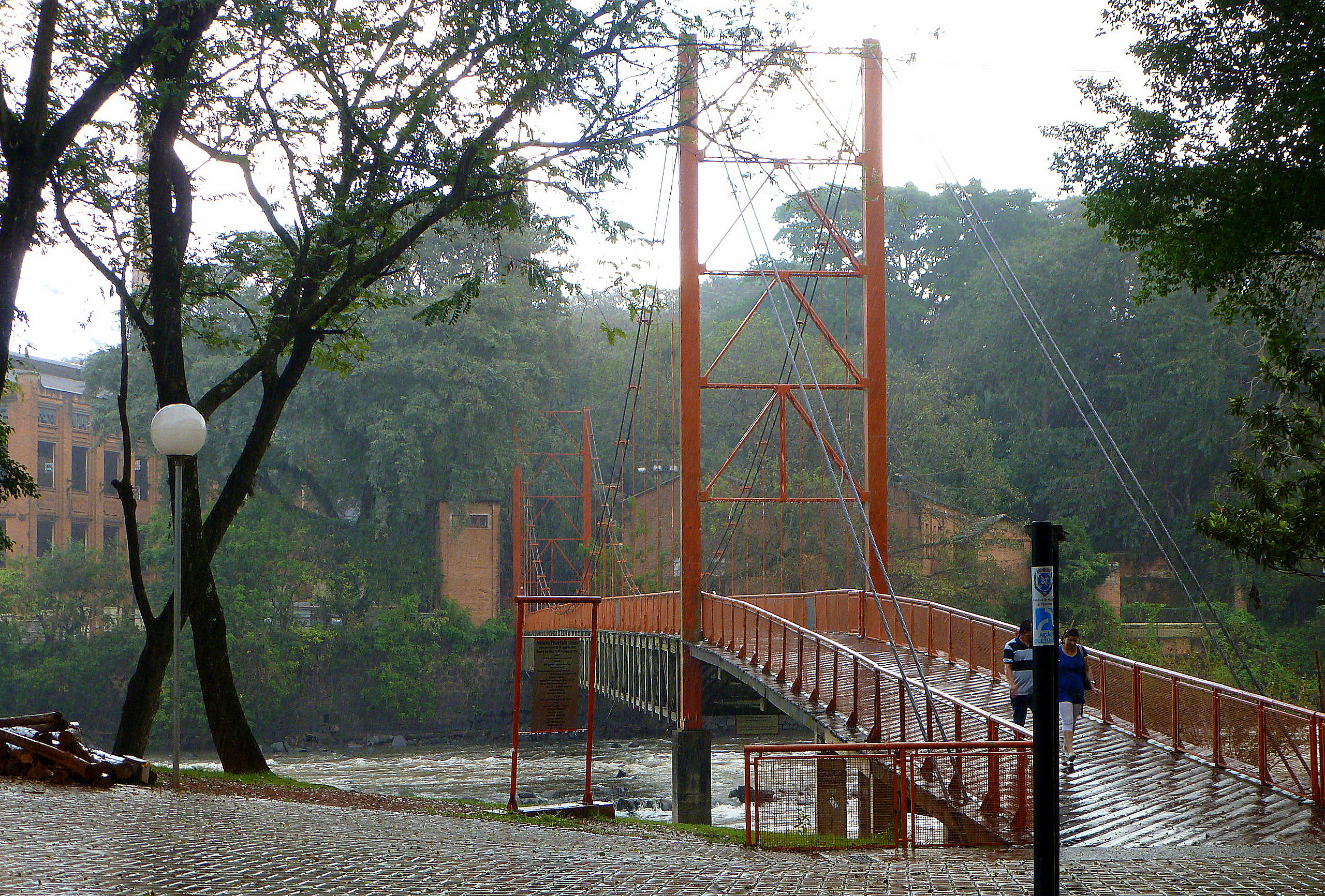 Ponte Pênsil